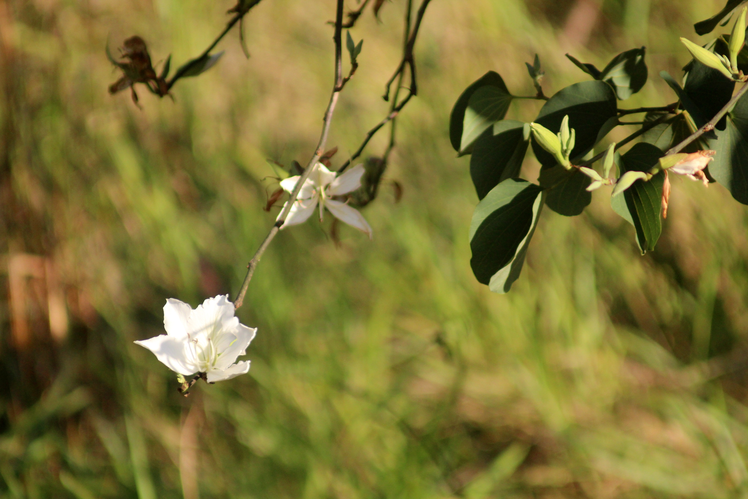 Detalhe de uma flores e folhas de uma árvore pata-de-vaca, do gênero Bauhinia.